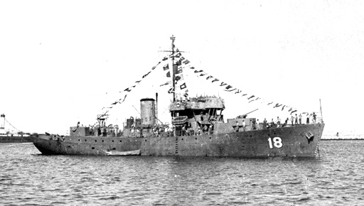 אוניית חיל הים ק-18 שמרה את הכינוי וג'ווד מקושטת לכבוד יום העצמאות